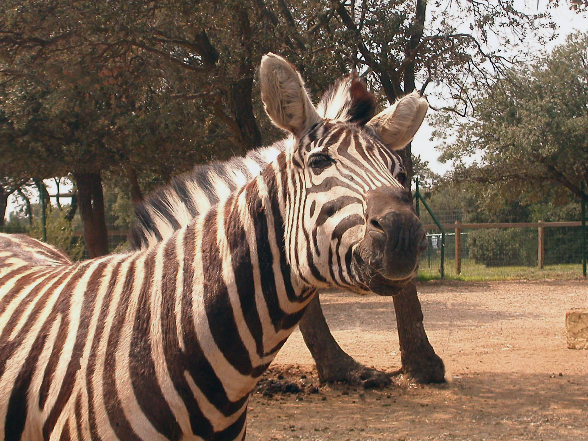 Zèbre à la Barben